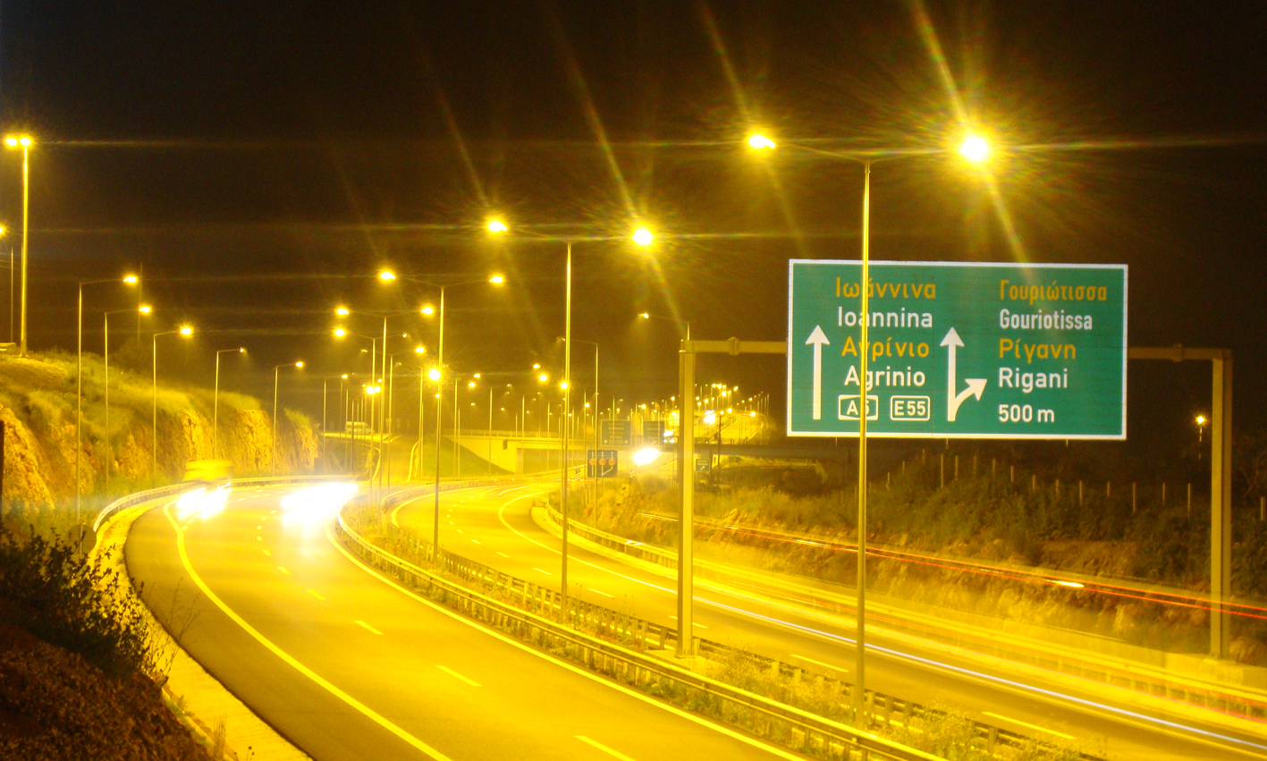 Rigani_interchange_Ionia_odos_1